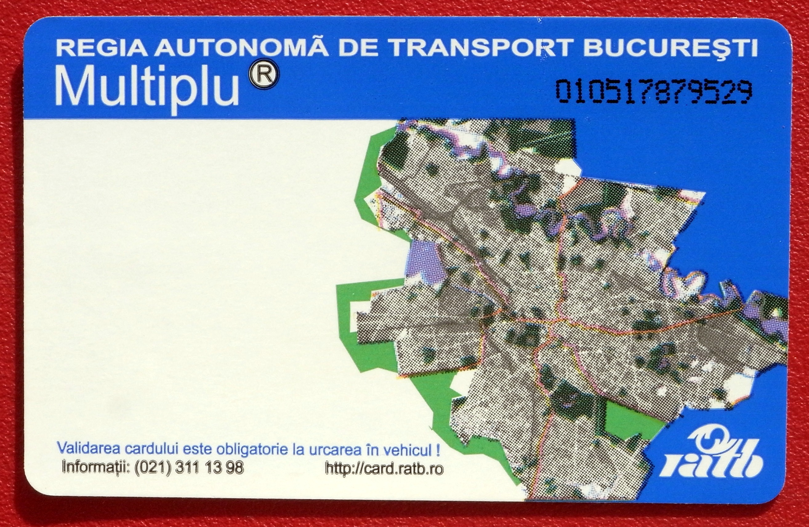 Mehrfahrtenkarte der ratb in Bukarest.